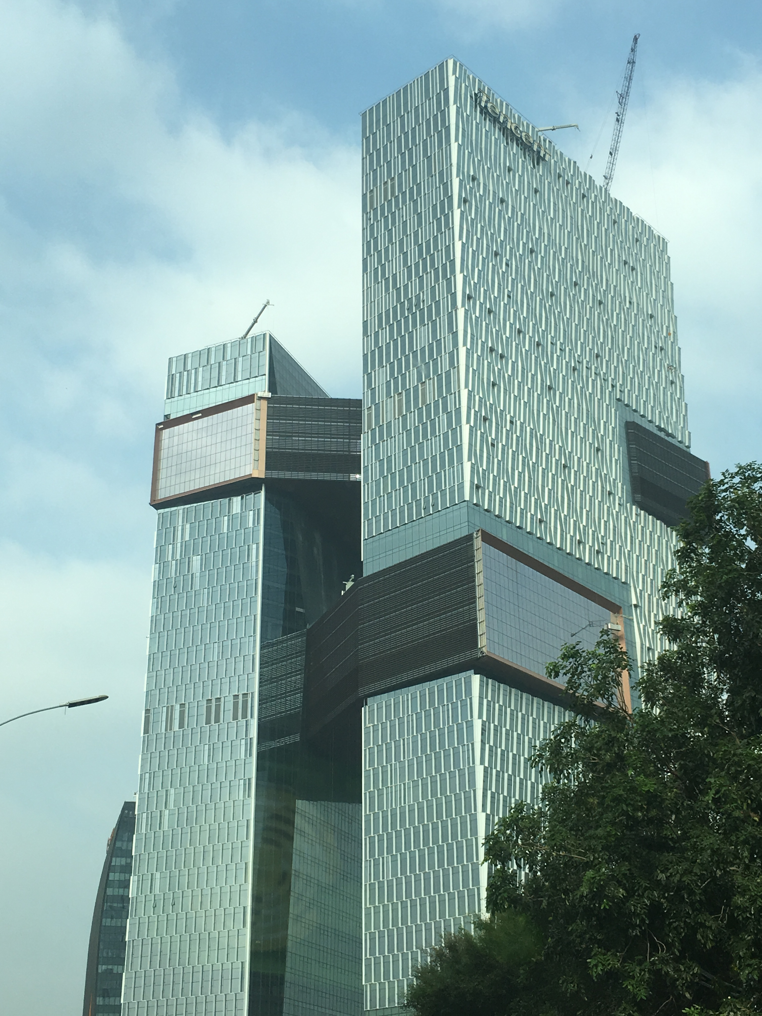 中文（中国大陆）: 腾讯滨海大厦